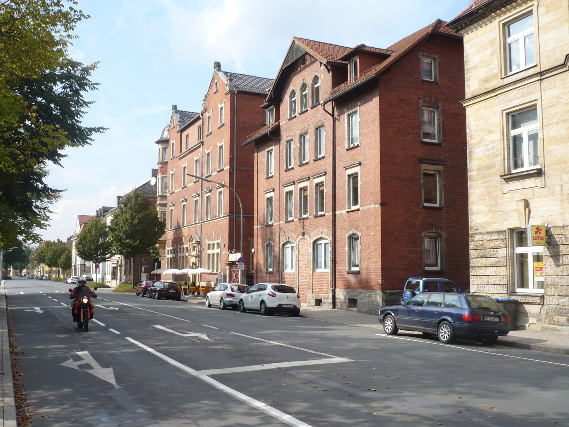 Rathenaustraße Bayreuth